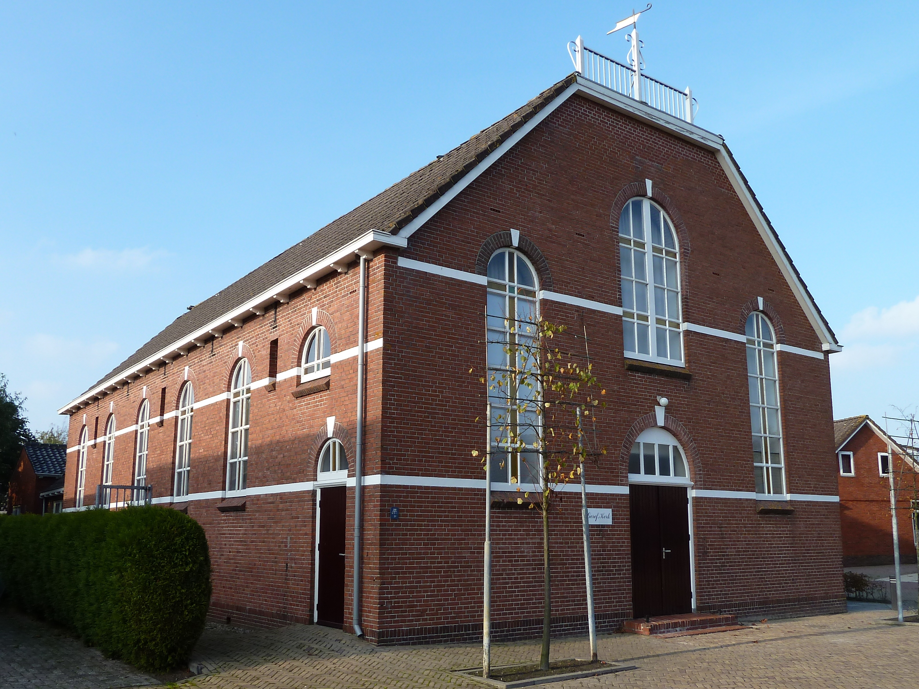 Gereformeerde kerk van Kommerzijl uit 1913.